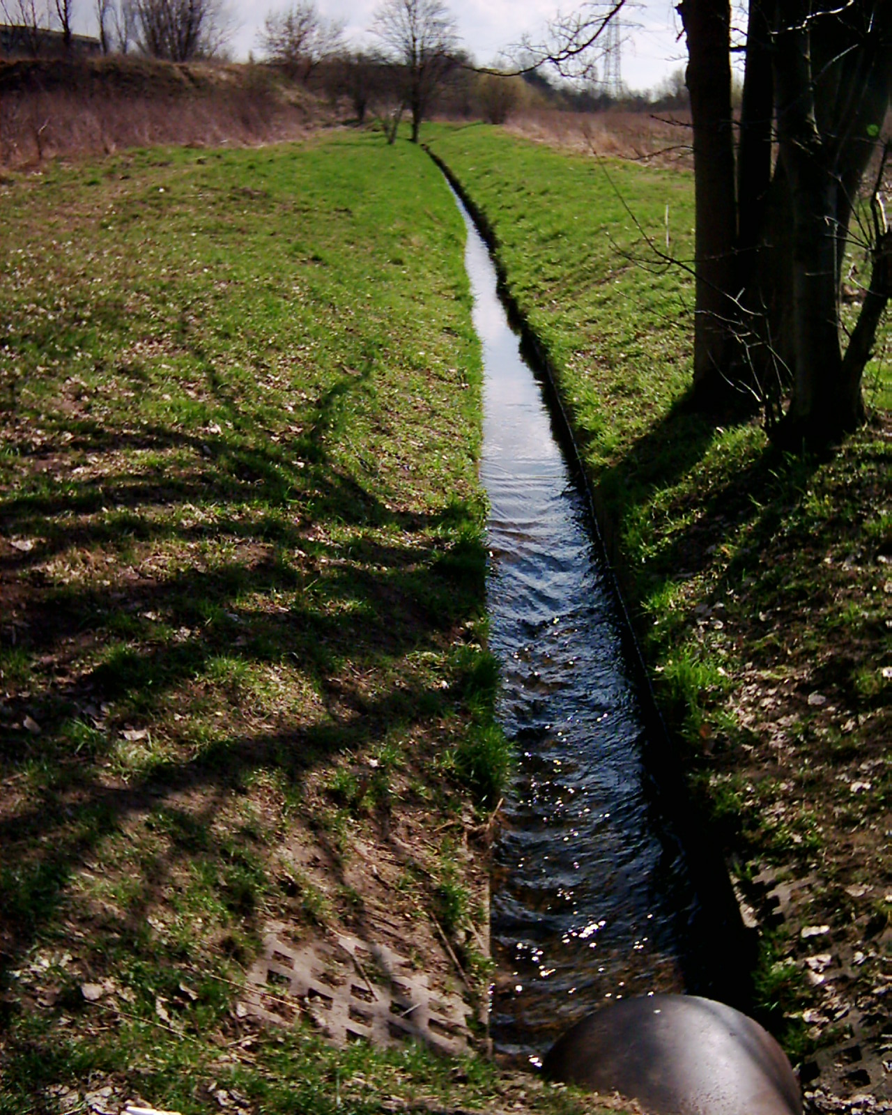 Der Kappgraben mündet von Osten her links in die Panke. Seinen Beginn nimmt er nördlich der Autobahn BAB 10 im Bereich des Klinikumgeländes auf dem Gelände, wo sich jetzt eine Kleingartenanlage befindet.